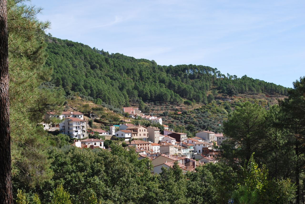 Guisando, localidad de la provincia de Ávila, España.